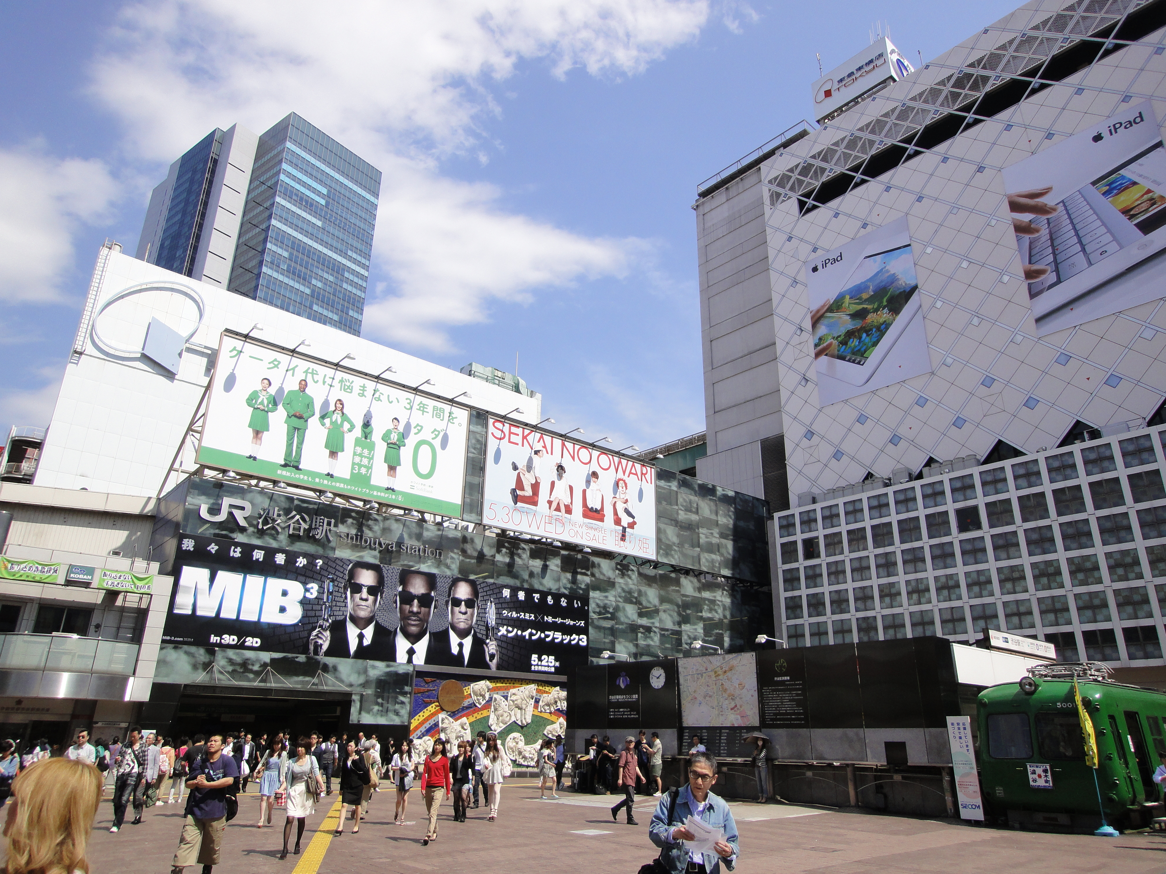 渋谷駅前